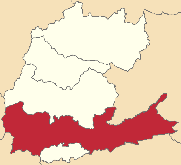 Mapa localizacor del cantón en Napo, Ecuador